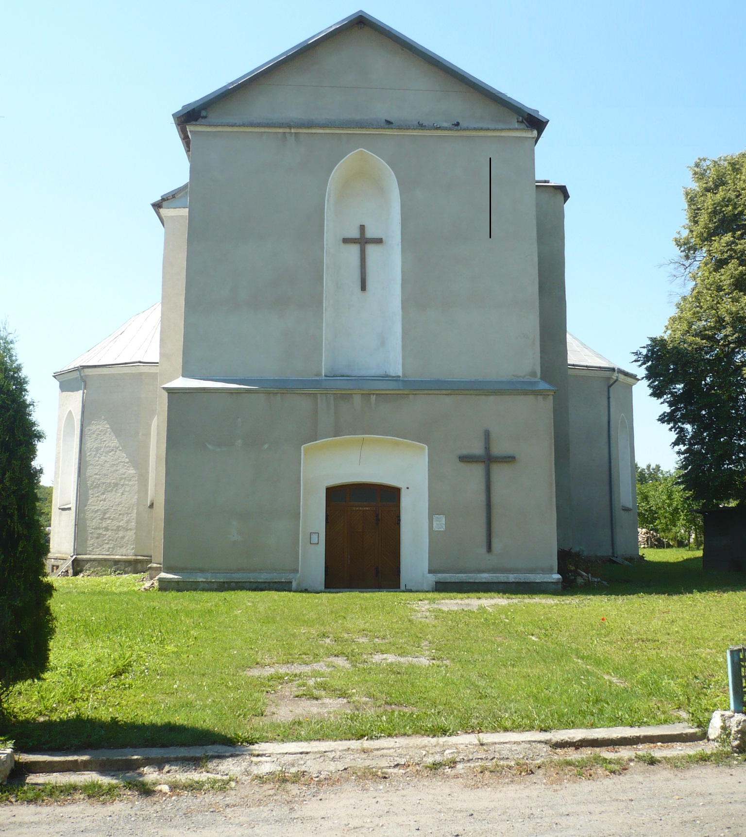 Potok Złoty. Kościół